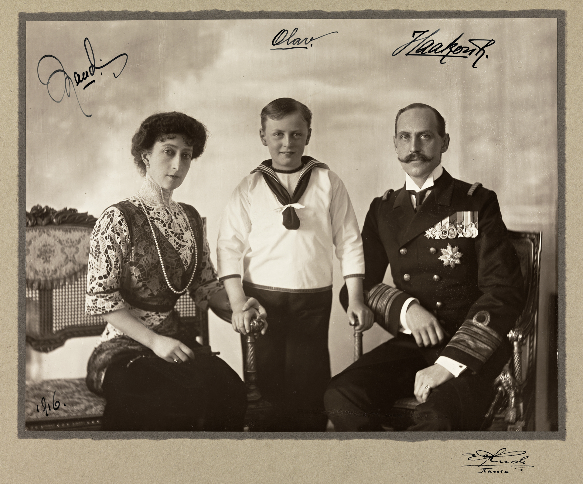 Tittel / Title: Portrett av Dronning Maud, Kronprins Olav og Kong Haakon VII Dato / Date: ca 1910 Fotograf / Photographer: Ernest Rude (1871-1948) Sted / Place: Oslo Eier / Owner Institution: Nasjonalbiblioteket / National Library of Norway Lenke / Link: Bildesignatur / Image Number: blds_04778